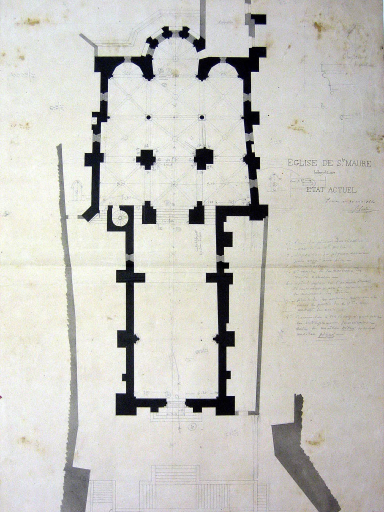 plan au sol